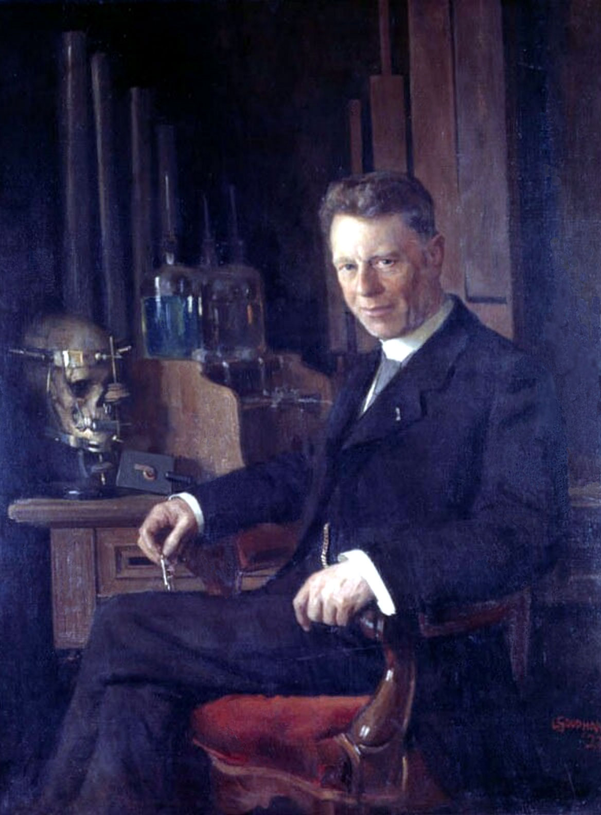 Portrait of Hendrik Zwaardemaker General Collections Keywords: Henrick Zwaardemaker